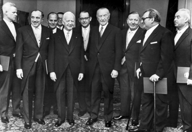 Zentralbild, 21.12.1962, Lübke überreichte Ernennungsurkunden Bundespräsident Lübke hat am 13. Dezember 1962 in seinem Amtssitz den neuen Ministern des Kabinetts Adenauer, die ihm vorher vom Bundeskanzler vorgestellt worden waren, die Ernennungsurkunden überreicht. UBz: vlnr: Bucher (Justiz), Dollinger (Schatzministerium); Barzel (Gesamtdeutsche Fragen); Bundespräsident Lübke; Dahlgrün (Finanzen); Bundeskanzler Adenauer; Niederalt (Bundesratsminister); Lenz (wissenschaftliche Forschung); und Heck (Familien- und Jugendfragen): (13.12.1962)